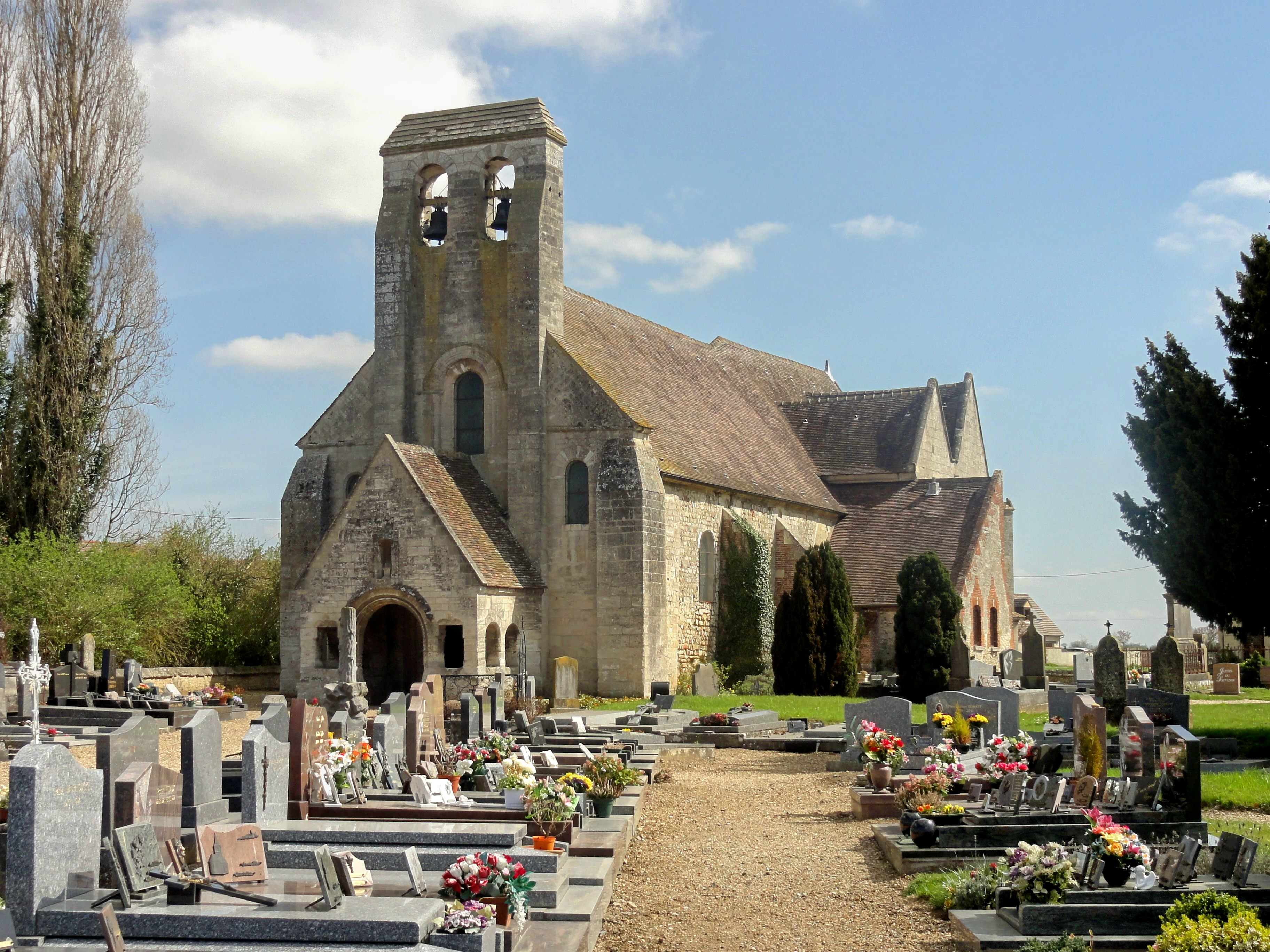 Vue depuis le sud-ouest.